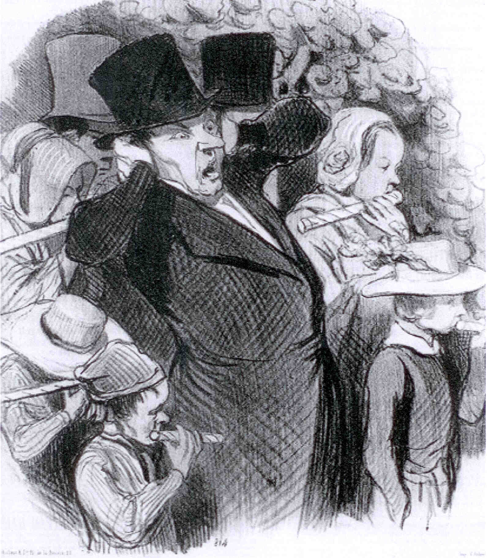 Détail d'une estampe figurant : Le retour de la foire de Saint-Cloud. Légende : "Au diable les mirlitons et les mirlitonneurs... Comment peut-on tolérer un pareil instrument dans un pays où on tolère déjà la Clarinette !..."